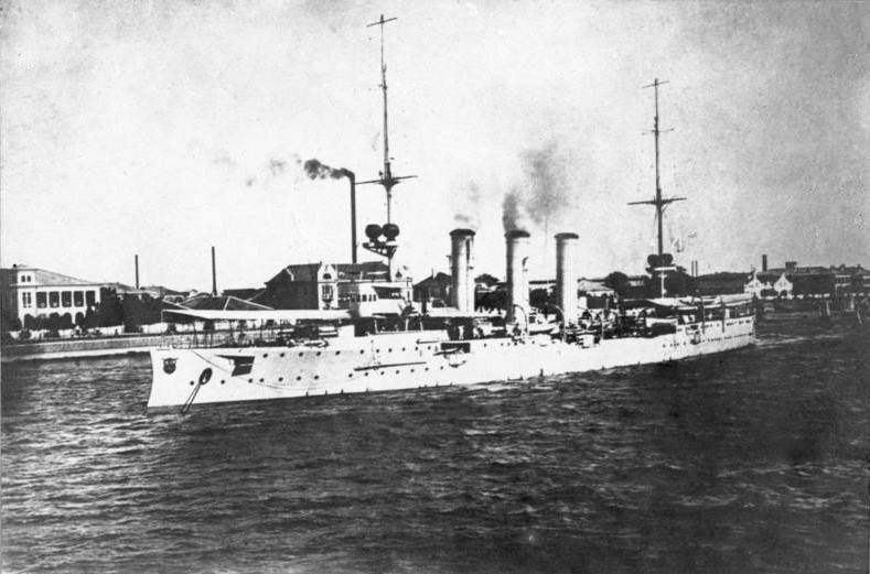 SMS "Emden" I im Hafen China, Tsingtau S.M.S."Emden" im Hafen. Frühjahr 1914 Rechts im Hintergrund das deutsche Arsenal. Information added by Wikimedia users.Das Bild zeigt die SMS Emden (1908).